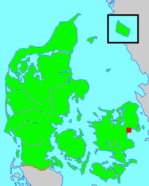 Kort sem sýnir staðsetningu Greve Strand í Danmörku.